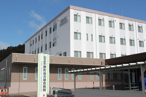 公立小野町地方総合病院の新病院。